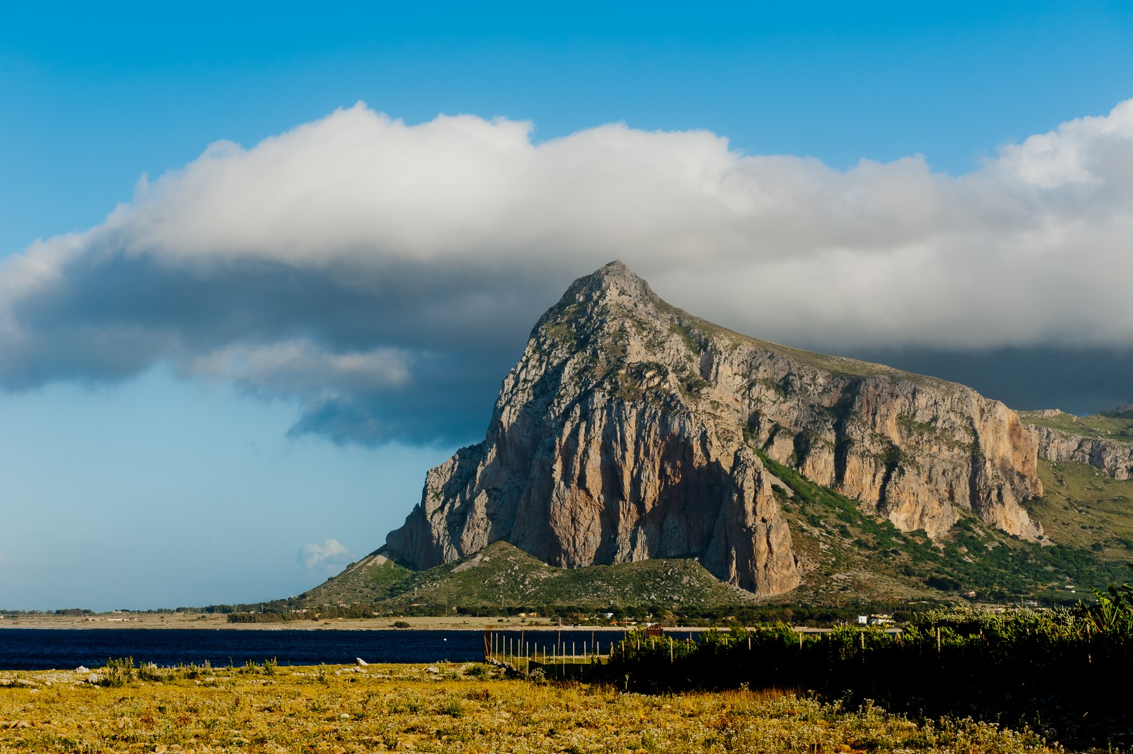 Panorama con lo sfondo di Monte Monaco